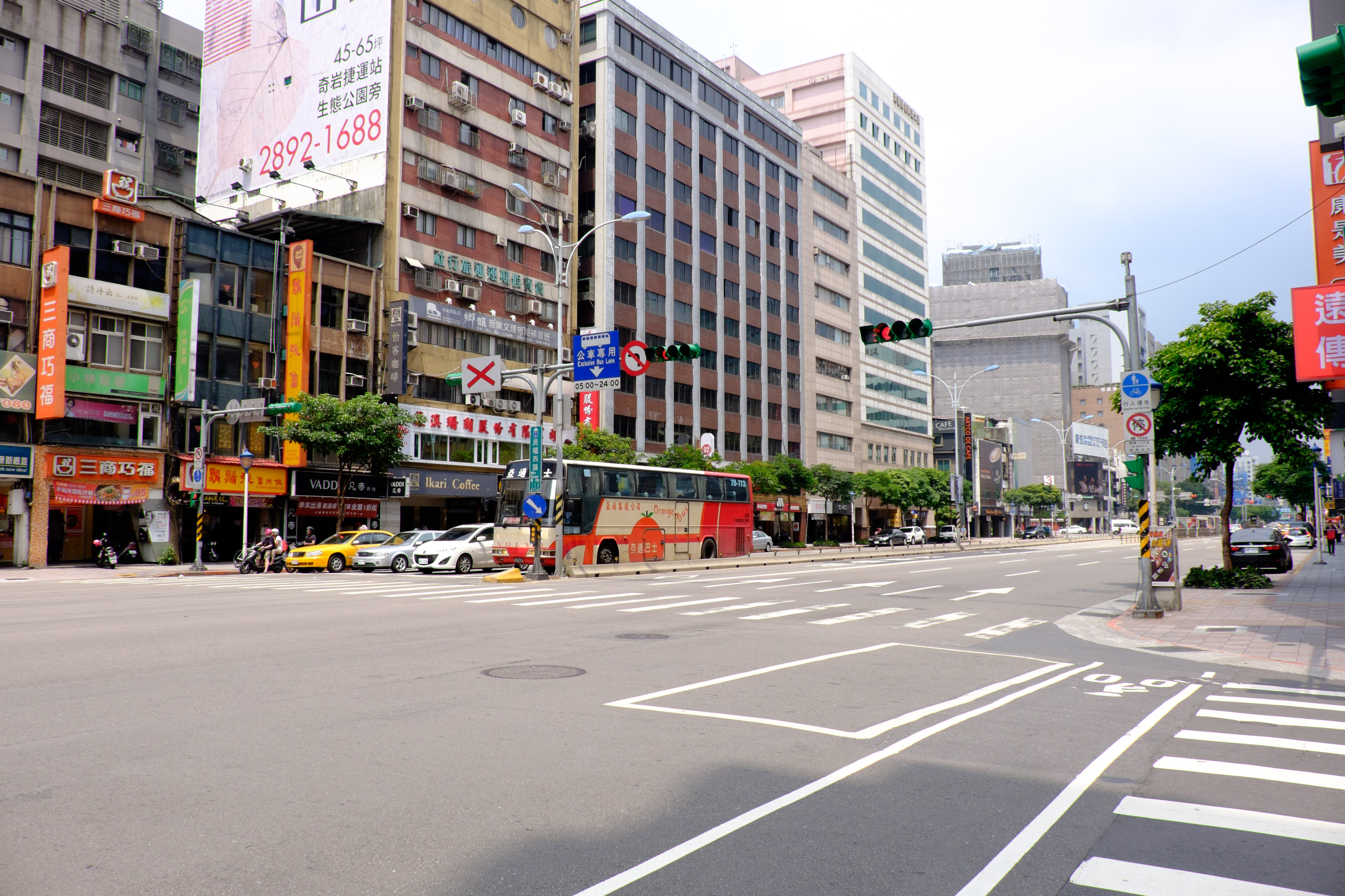 從臺北市中山區民權西路與天祥路路口東望民權西路。